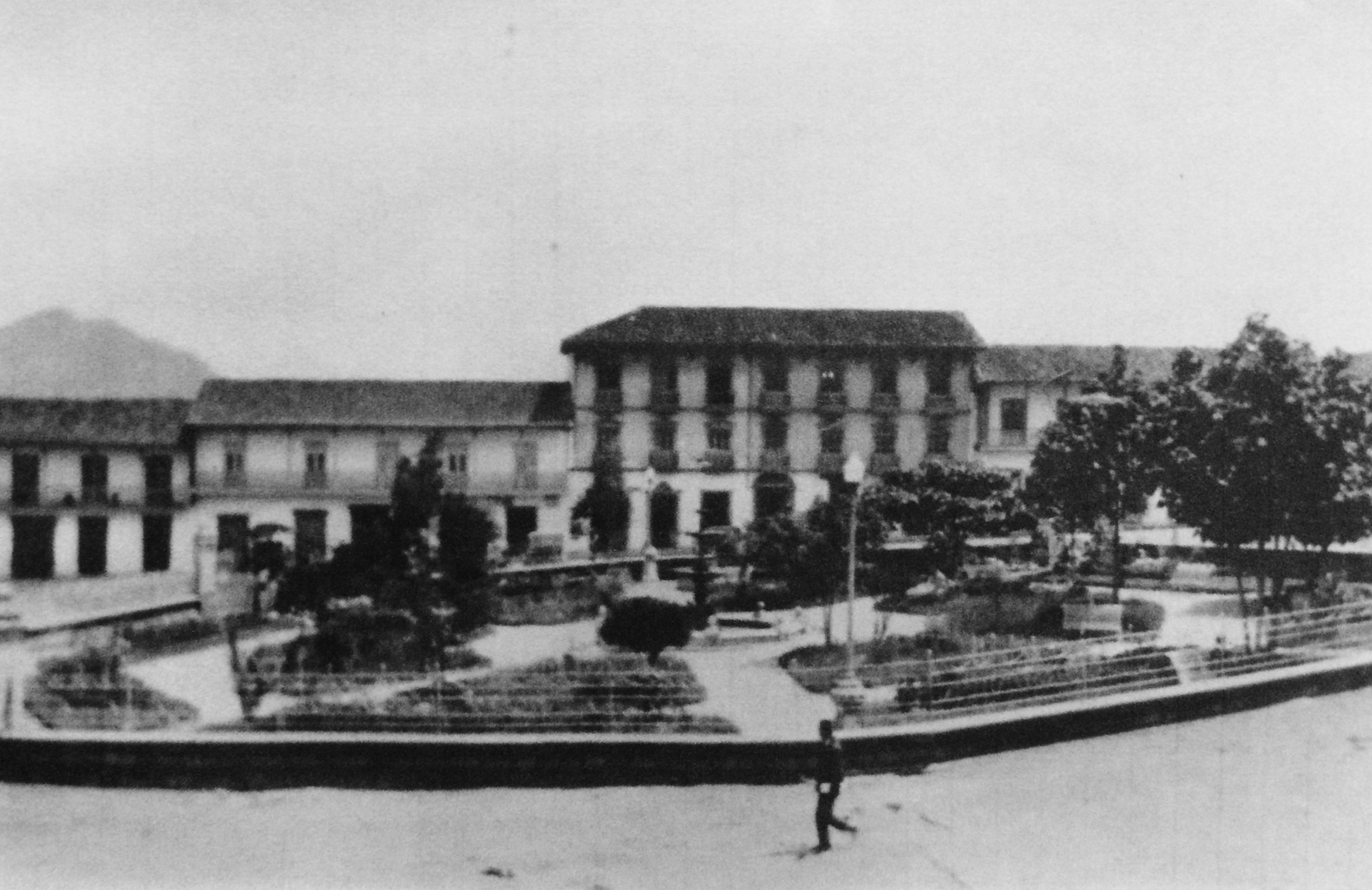 Plaza de Ruíz y Zapata en la década de 1920